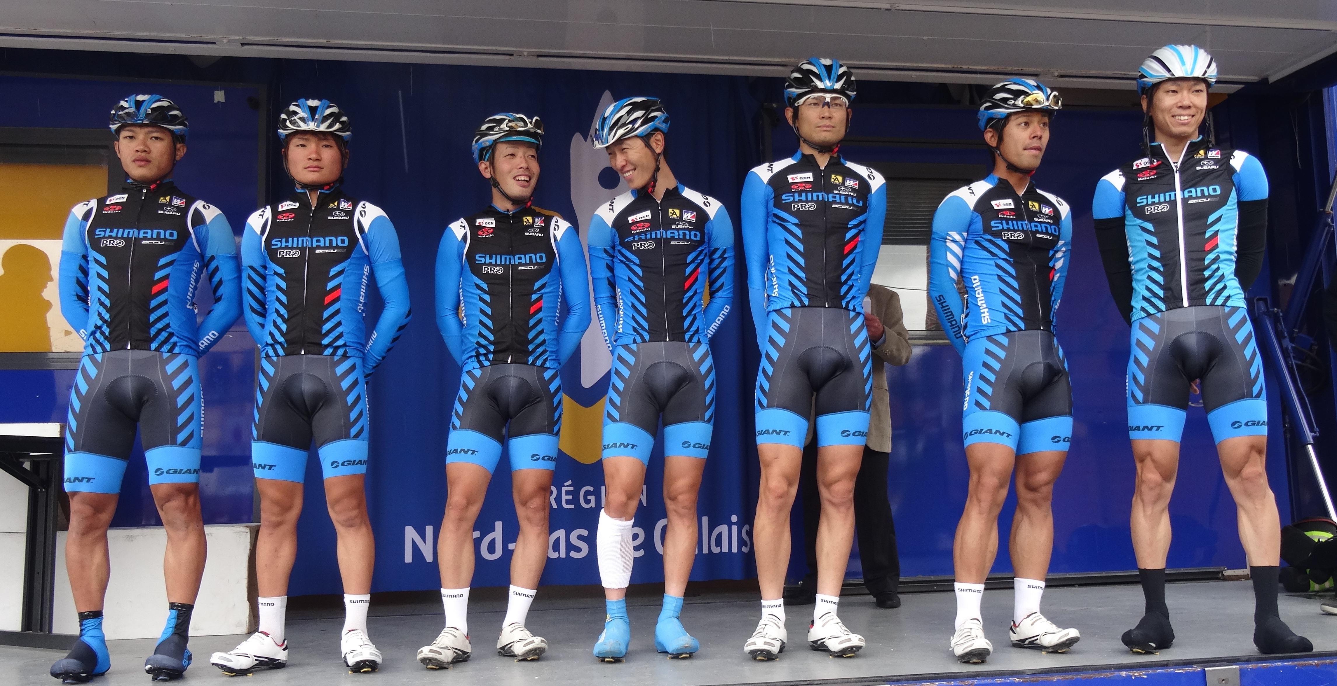 Reportage photographique réalisé le dimanche 13 juillet à l'occasion du départ et de l'arrivée de la Ronde pévéloise 2014 à Pont-à-Marcq, Nord-Pas-de-Calais, France.